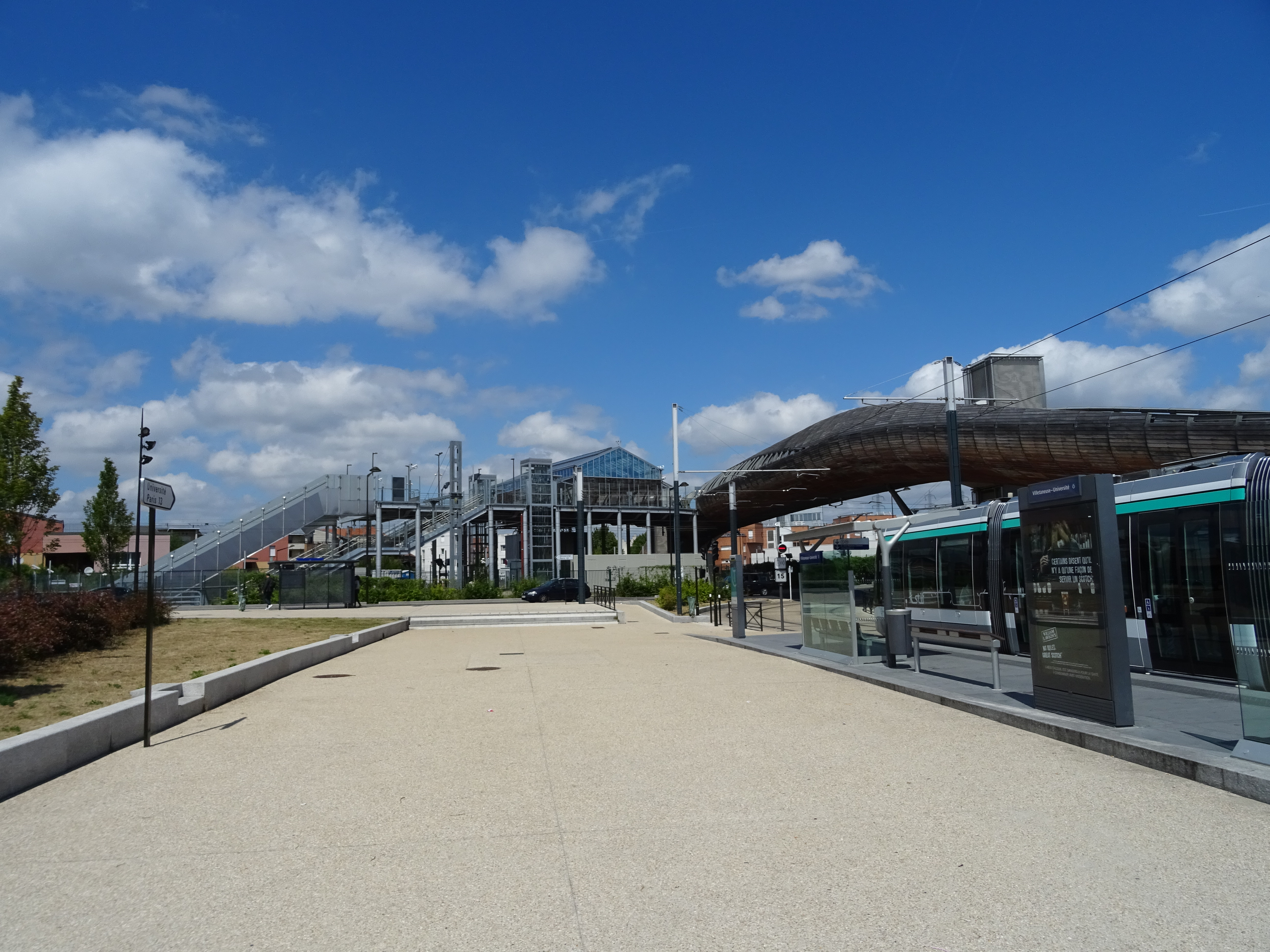 Vue d'ensemble du pôle multimodal de Villetaneuse-Université